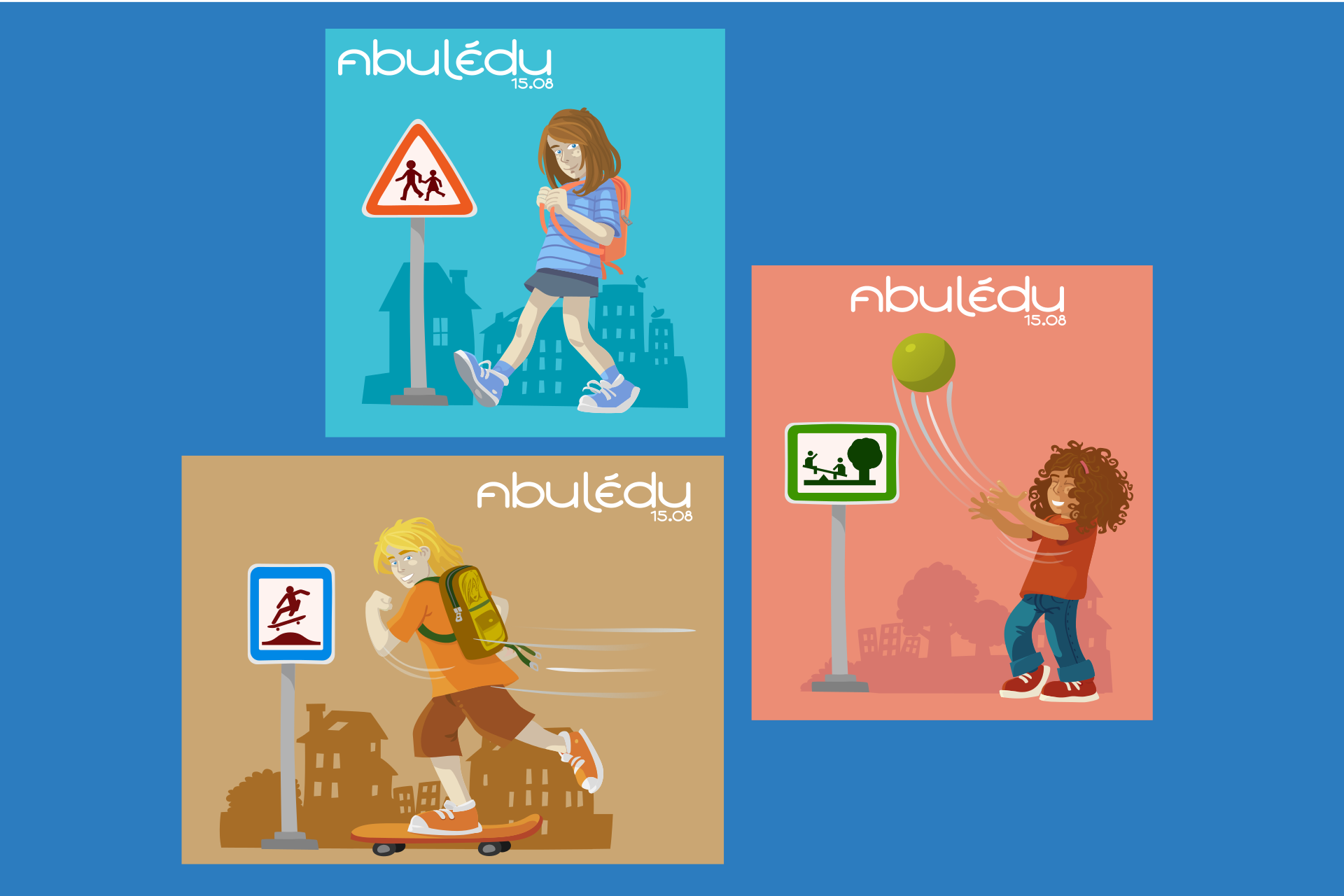 Sortie de la 15.08 d'abulédu, montage A. Pérat pour RyXéo.